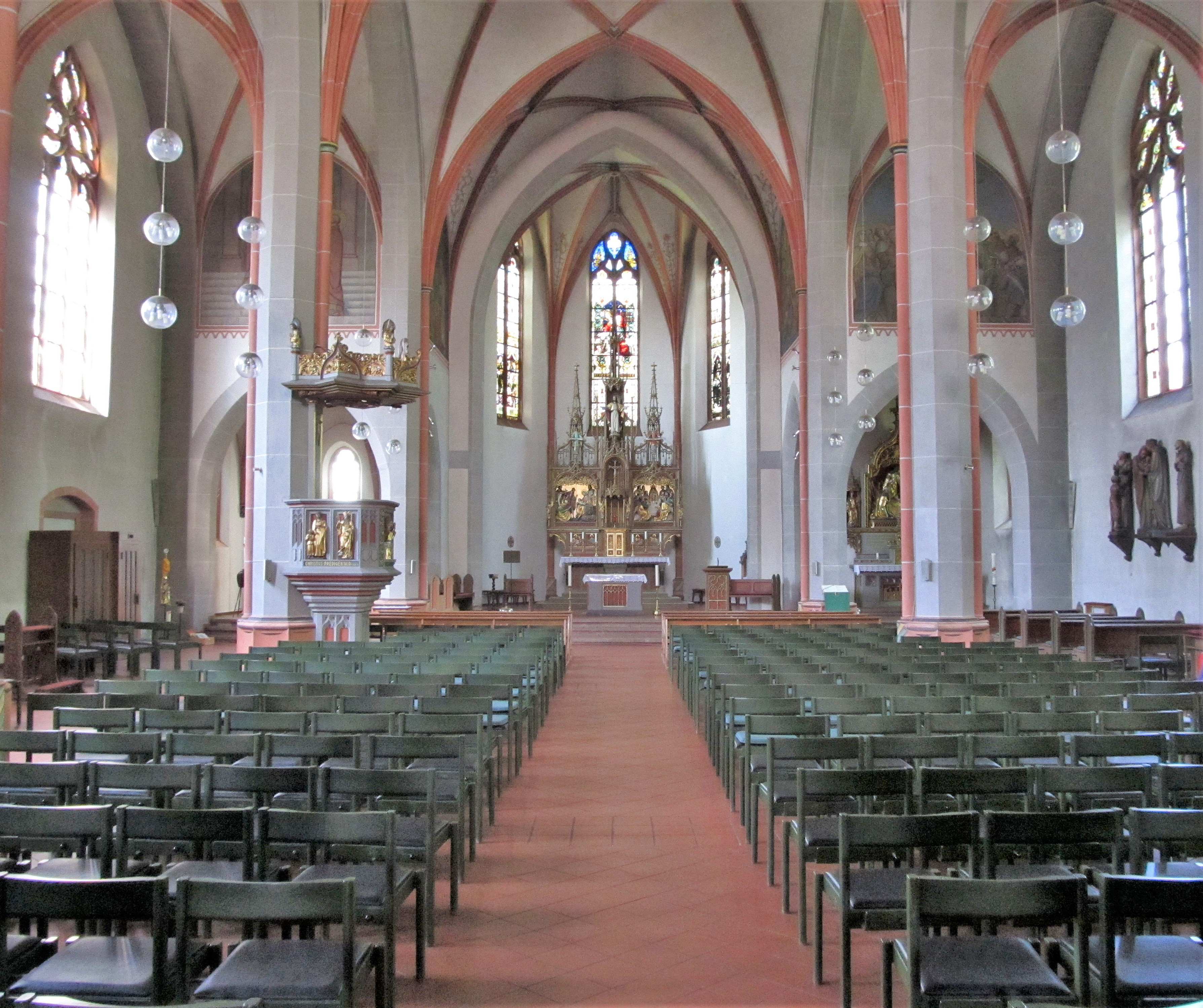 Blick ins Innere der katholischen Pfarrkirche Herz Jesu in Elversberg, Saarland